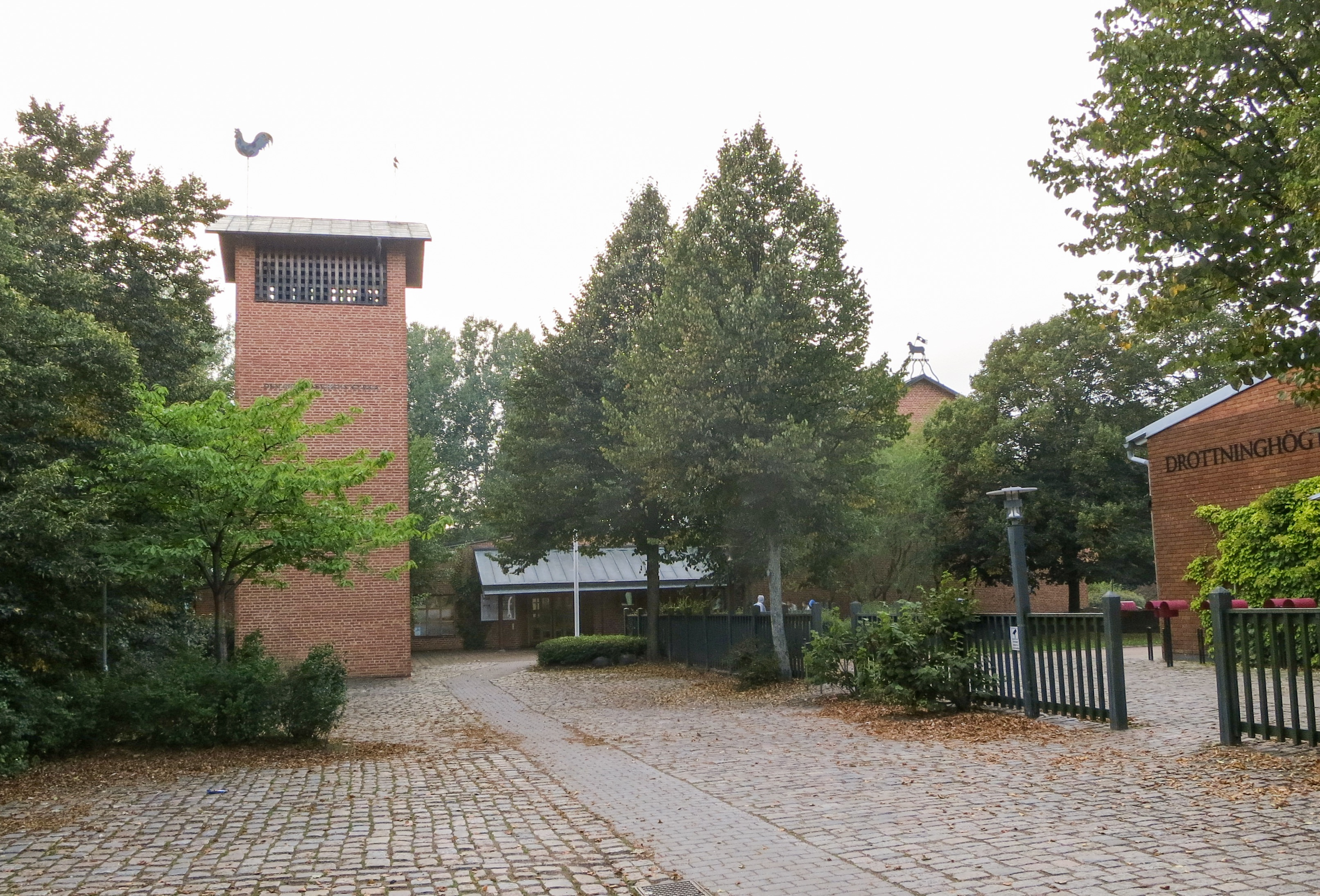 Den gode herdens kyrka (Drottninghögskolan 3)